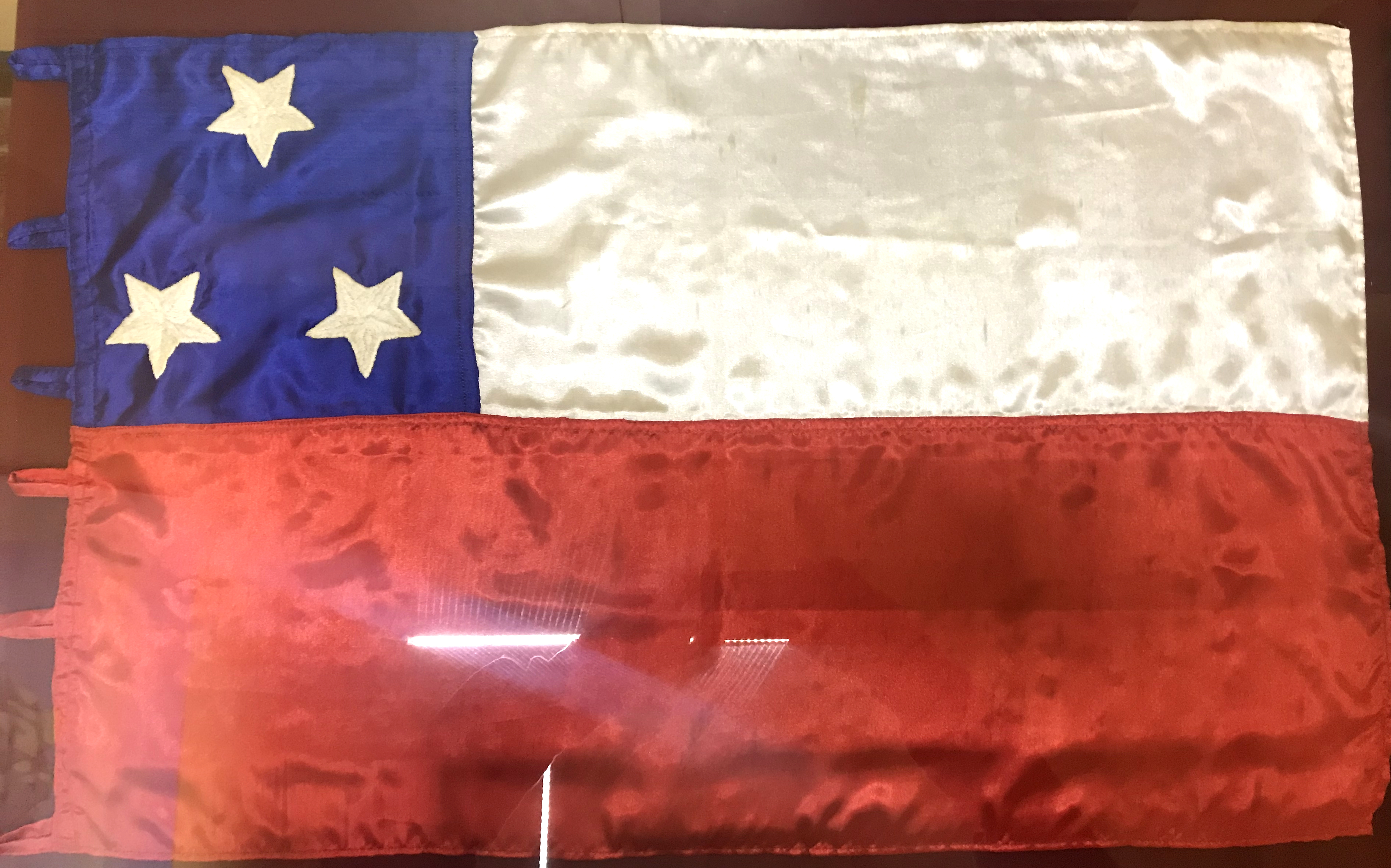 Bandera de la escuadra Libertadora del Perú.